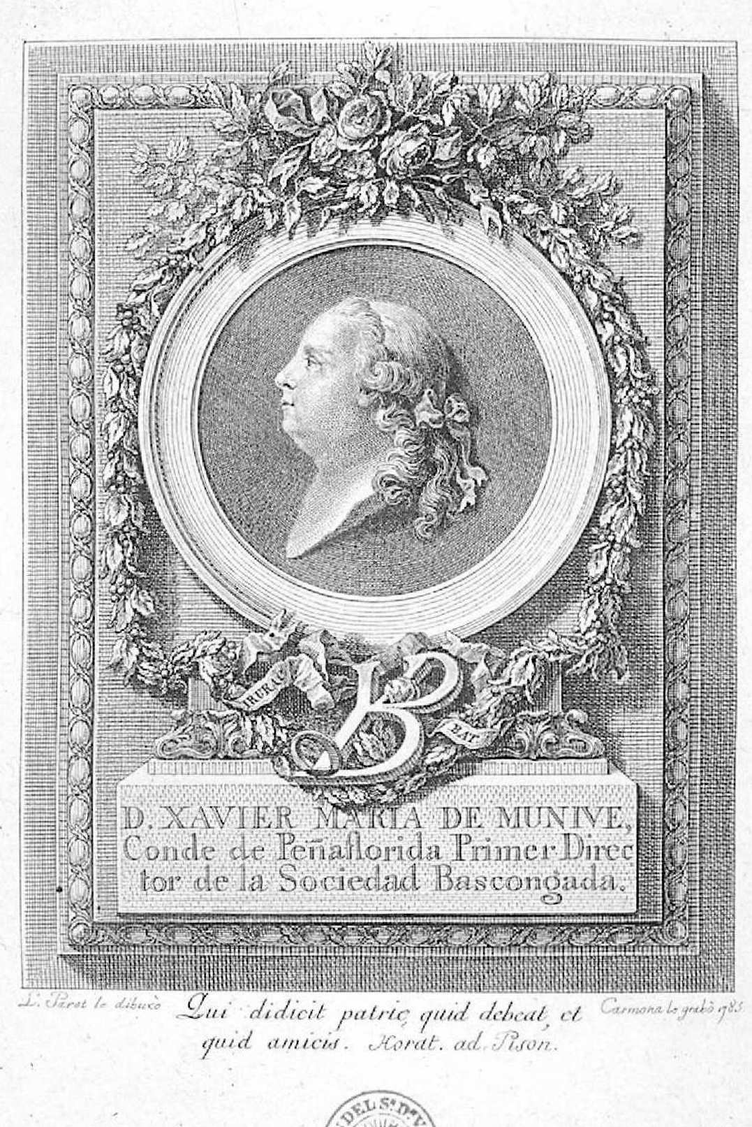 Retrato de Xavier María de Munive, conde de Peñaflorida, primer director de la Sociedad Bascongada, grabado de Manuel Salvador Carmona por dibujo de Luis Paret. Aguafuerte y buril, 1785. Biblioteca Nacional de España.